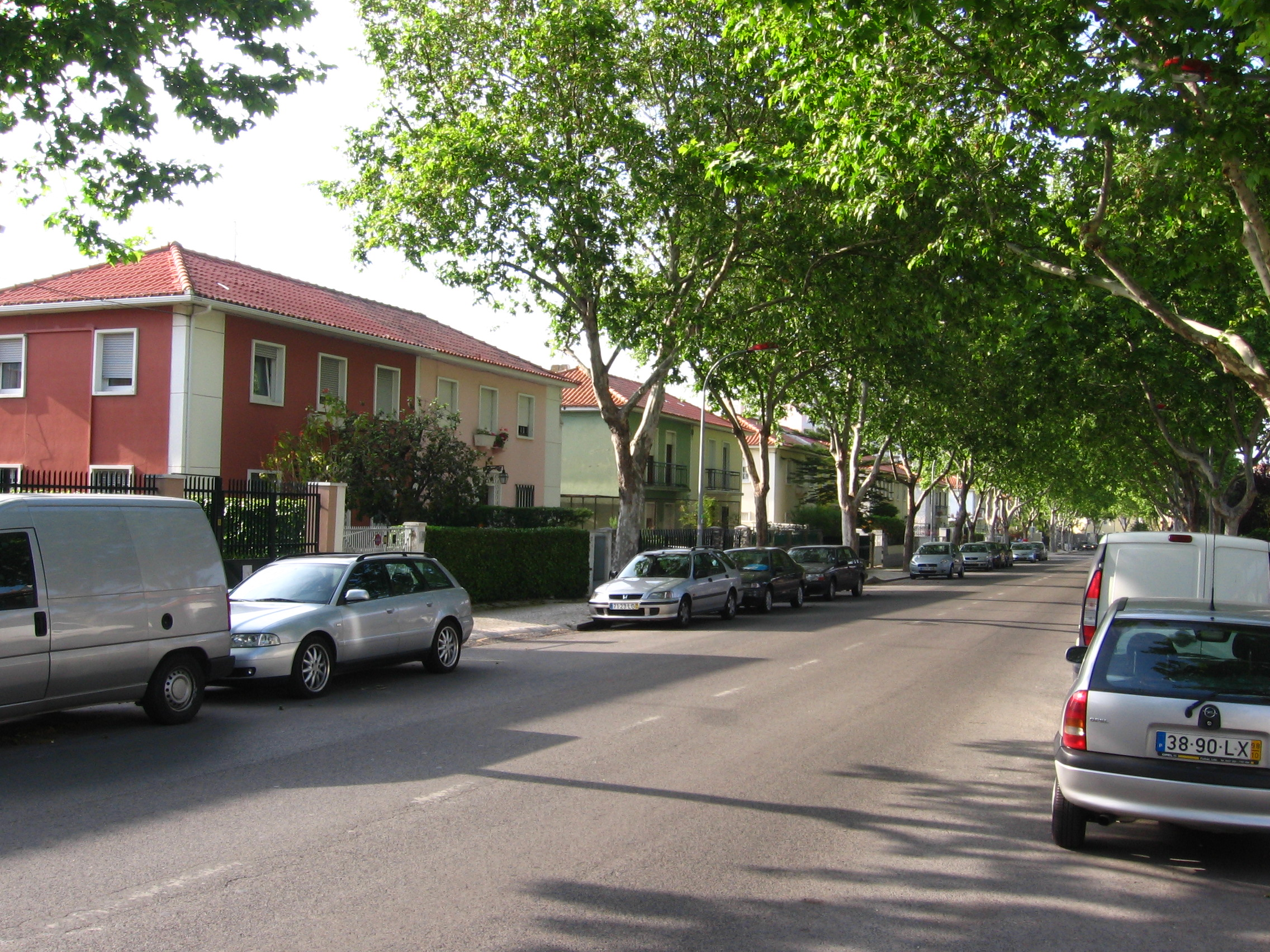 Bairro de Santa Cruz, Lisboa.